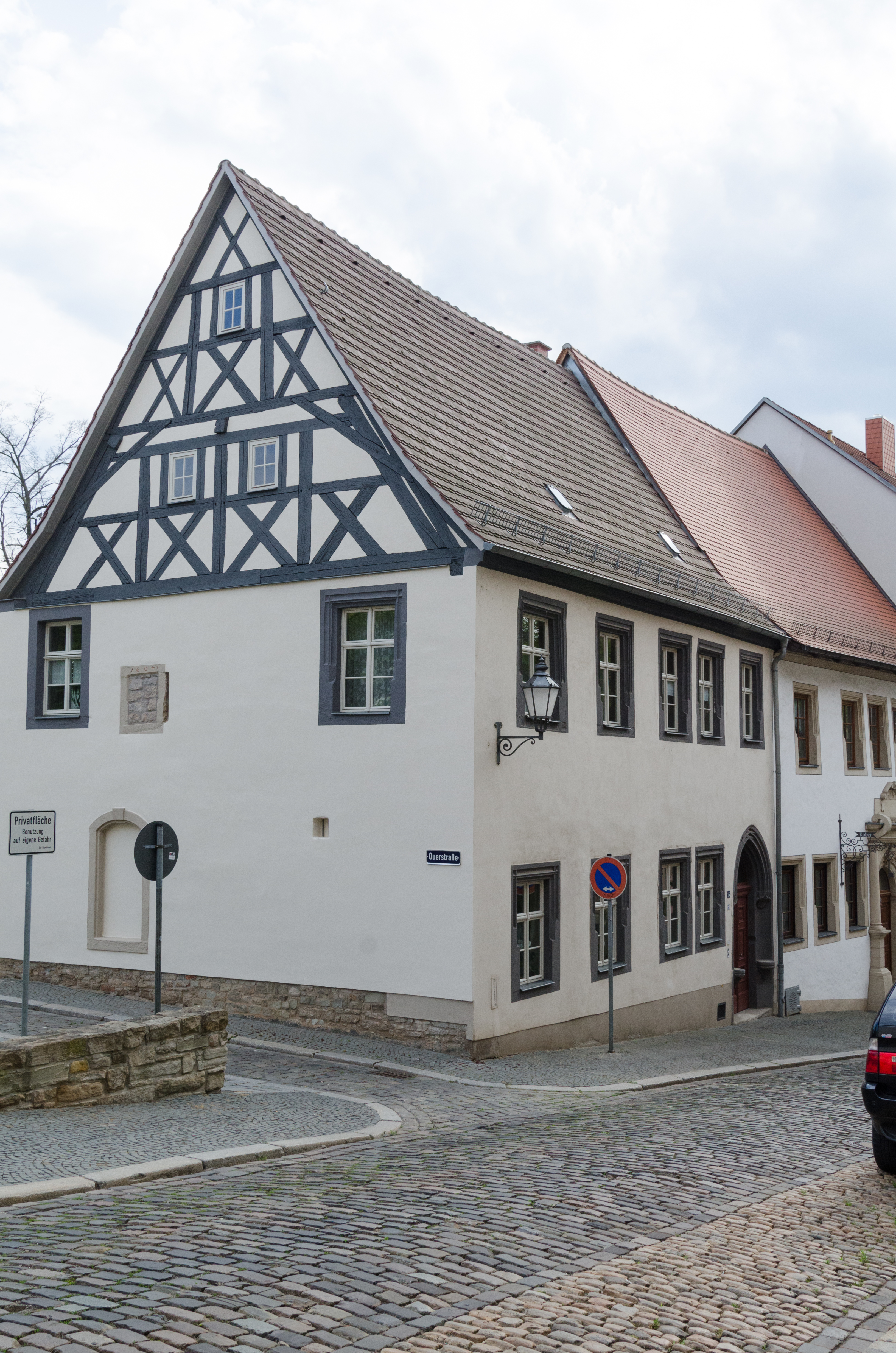 Zeitz, Messerschmiedestraße 15